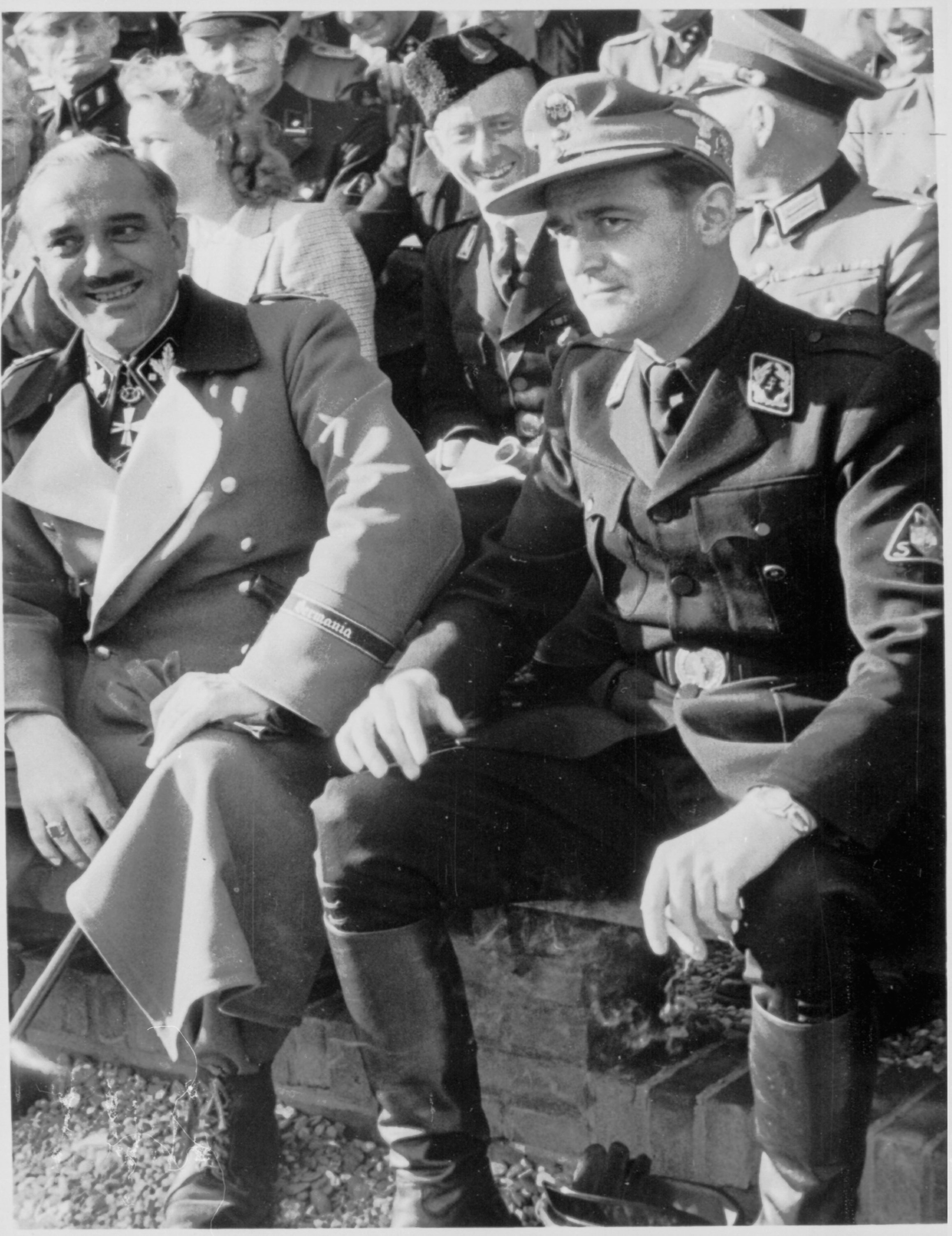 Demelhuber en Cornelis van Geelkerken. Deze foto is afkomstig uit het archief van de Fotodienst der NSB.